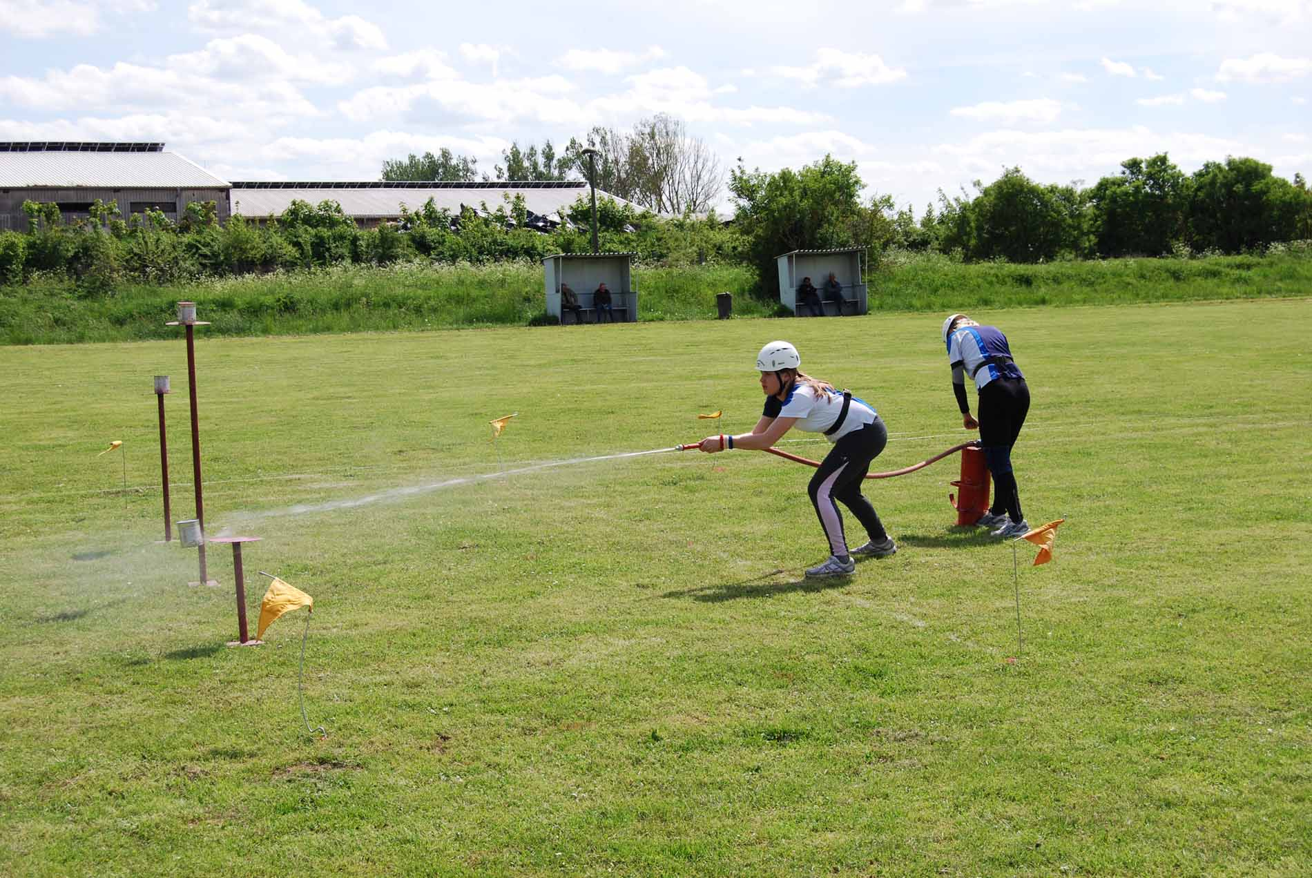 Zielen bei der Gruppenstafette - Team Mecklenburg-Vorpommern beim Deutschlandpokal 2010 in Tribsees